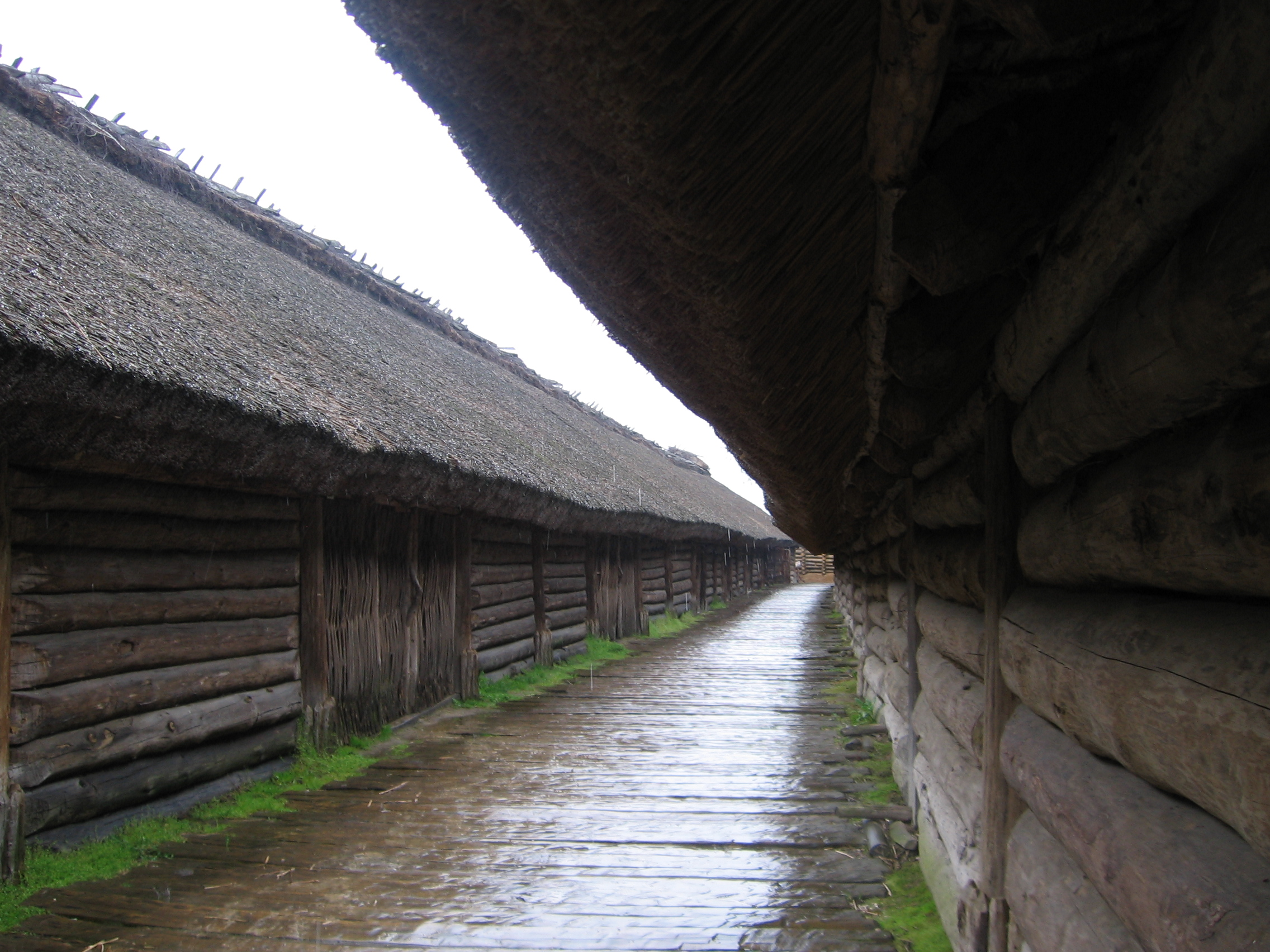 Zdjęcie rzędu domów w osadzie w Biskupinie.